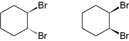 Cis-Trans-Beschreibung